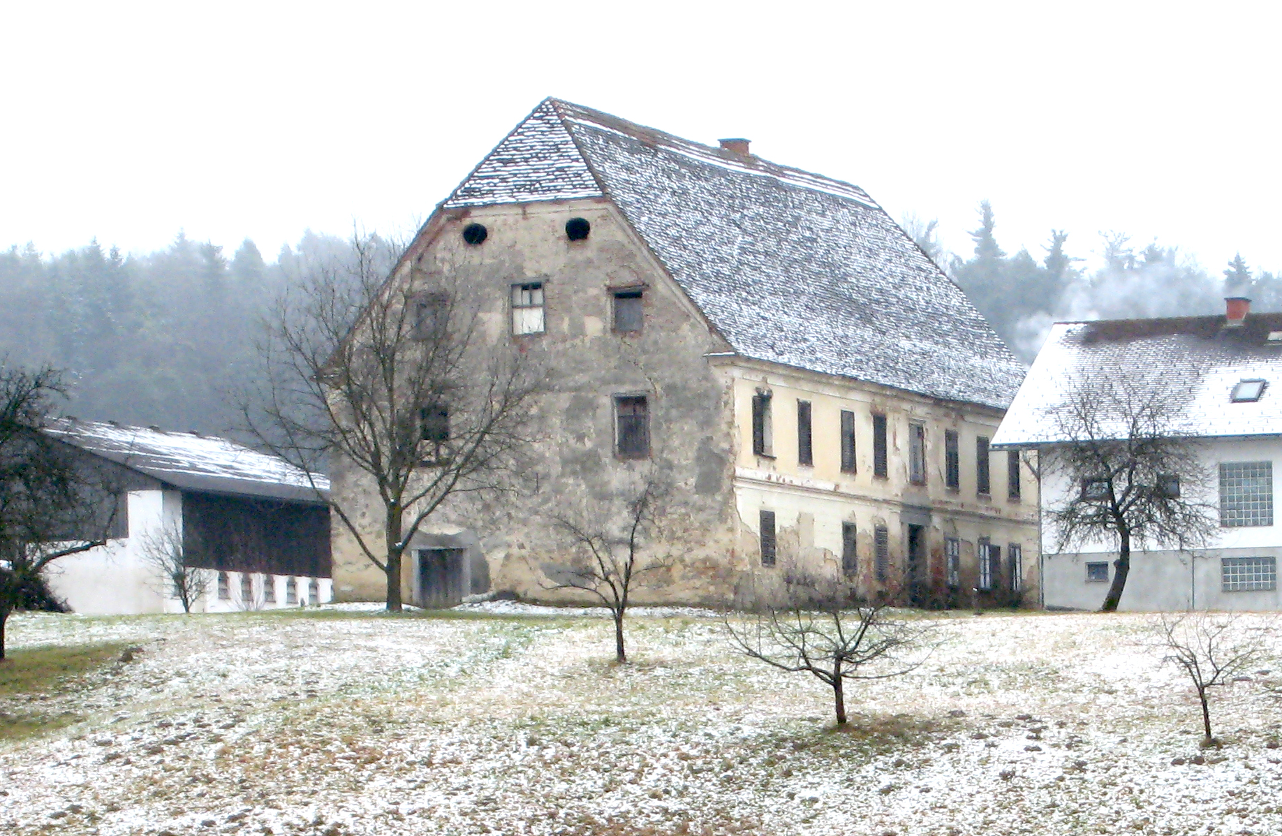 Grieshof